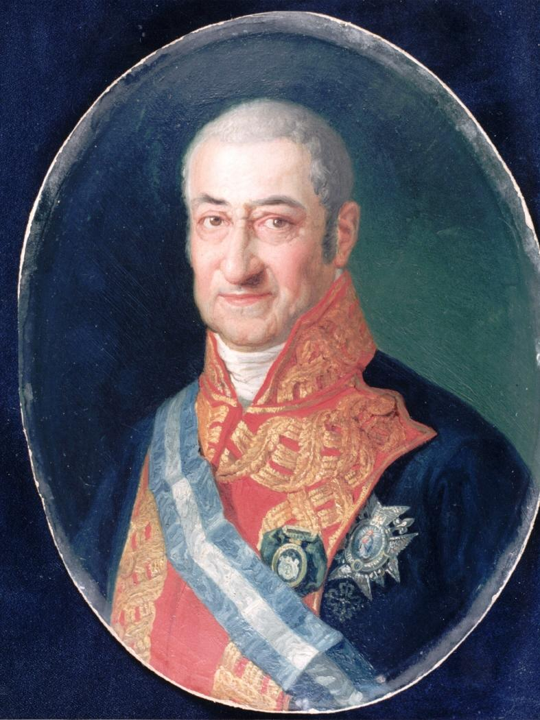 Retrato del aristócrata español Felipe Carlos Osorio y Castelví (1762-1819), que fue VII conde de Cervellón y marqués de Nules y de Quirra. Aparece con el uniforme de gala de teniente general del ejército español y ostentando sobre su casaca la gran cruz y la banda de la Orden de Carlos III y la cruz de caballero de la Orden de Alcántara, además de la venera de otra condecoración que aún no ha sido identificada por los historiadores. Felipe Carlos Osorio y Castelví fue el VII conde de Cervellón, y el primero en ostentar ese título del linaje de los Osorio. En 1789 contrajo matrimonio con María Magdalena de la Cueva y de la Cerda, y falleció el 23 de octubre de 1819, a los 57 años, por lo que debió haber sido retratado por Vicente López Portaña poco antes de ese año, ya que el retrato corresponde al de un hombre anciano.